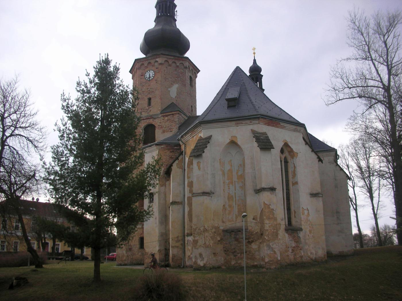 Kirche von Jindřichovice